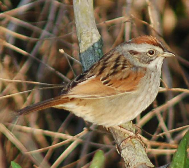 Swamp Sparrow (Melospiza georgiana)